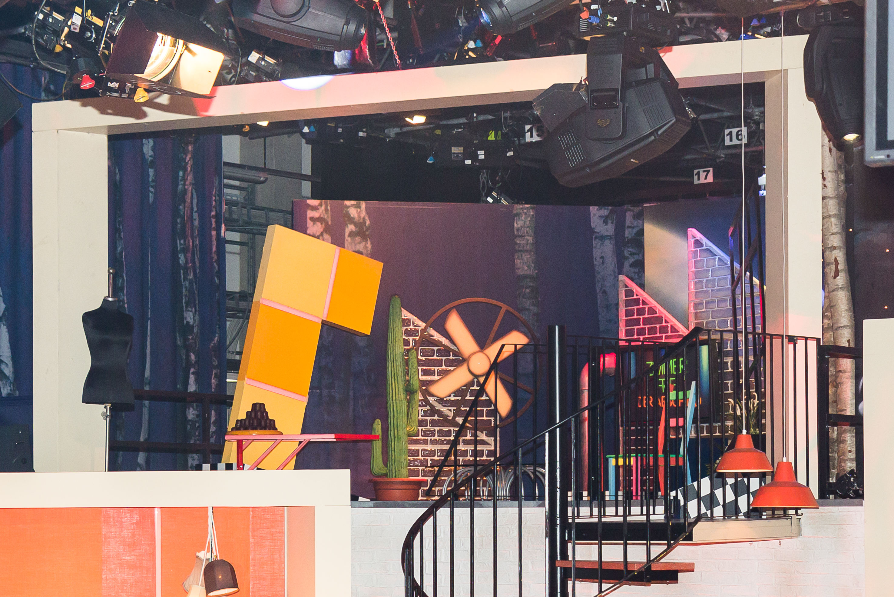 Zimmer frei - der Abschied Foto: Blick in das Zimmer, in dem die Einzelinterviews (meist) durch Christine Westermann geführt wurden